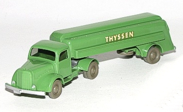 Wiking-Werbemodell Thyssen, das teuerste Wiking-Modell